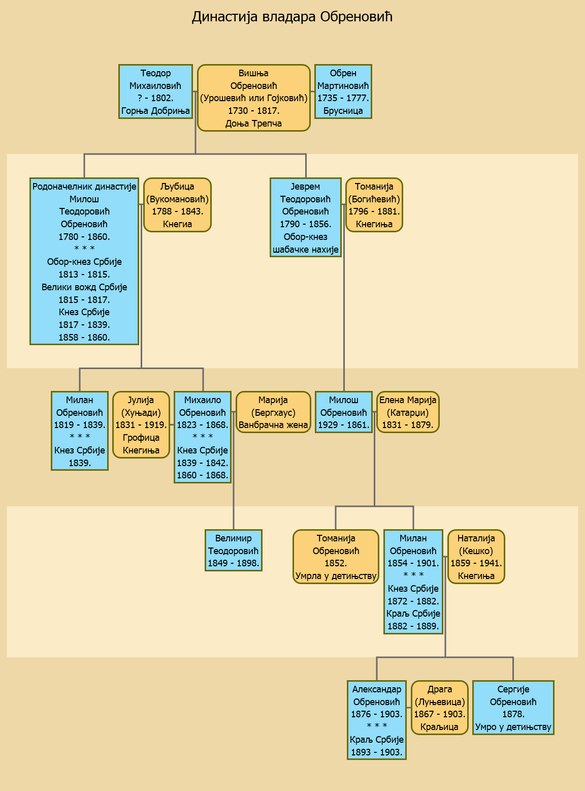 Српски (ћирилица): Породично стабло пунородних побочних сродника династије Обреновић.